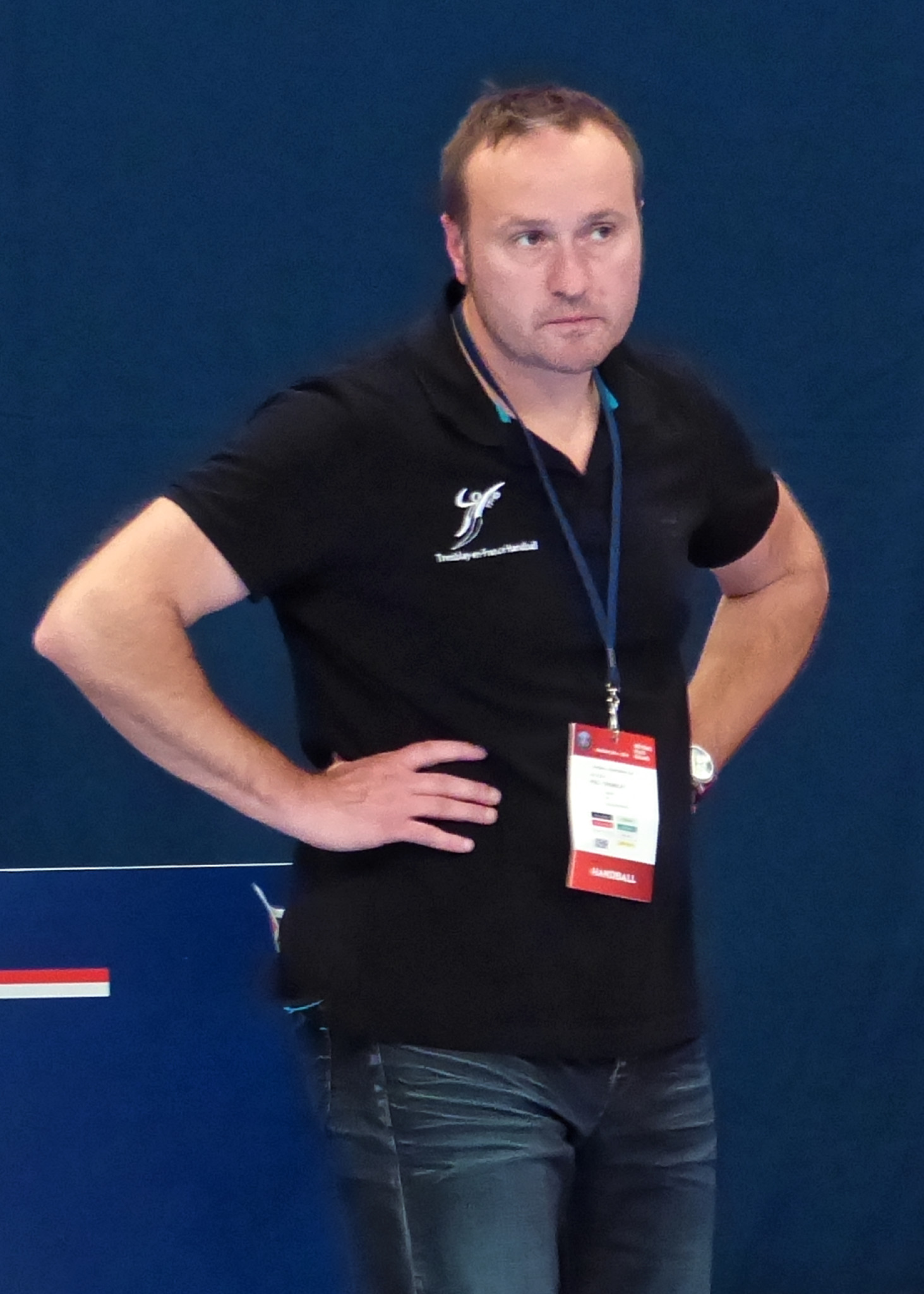 Rencontre de la 5e journée de LNH entre PSG Handball et Tremblay en France Handball. A Coubertin, le 08 octobre 2014.